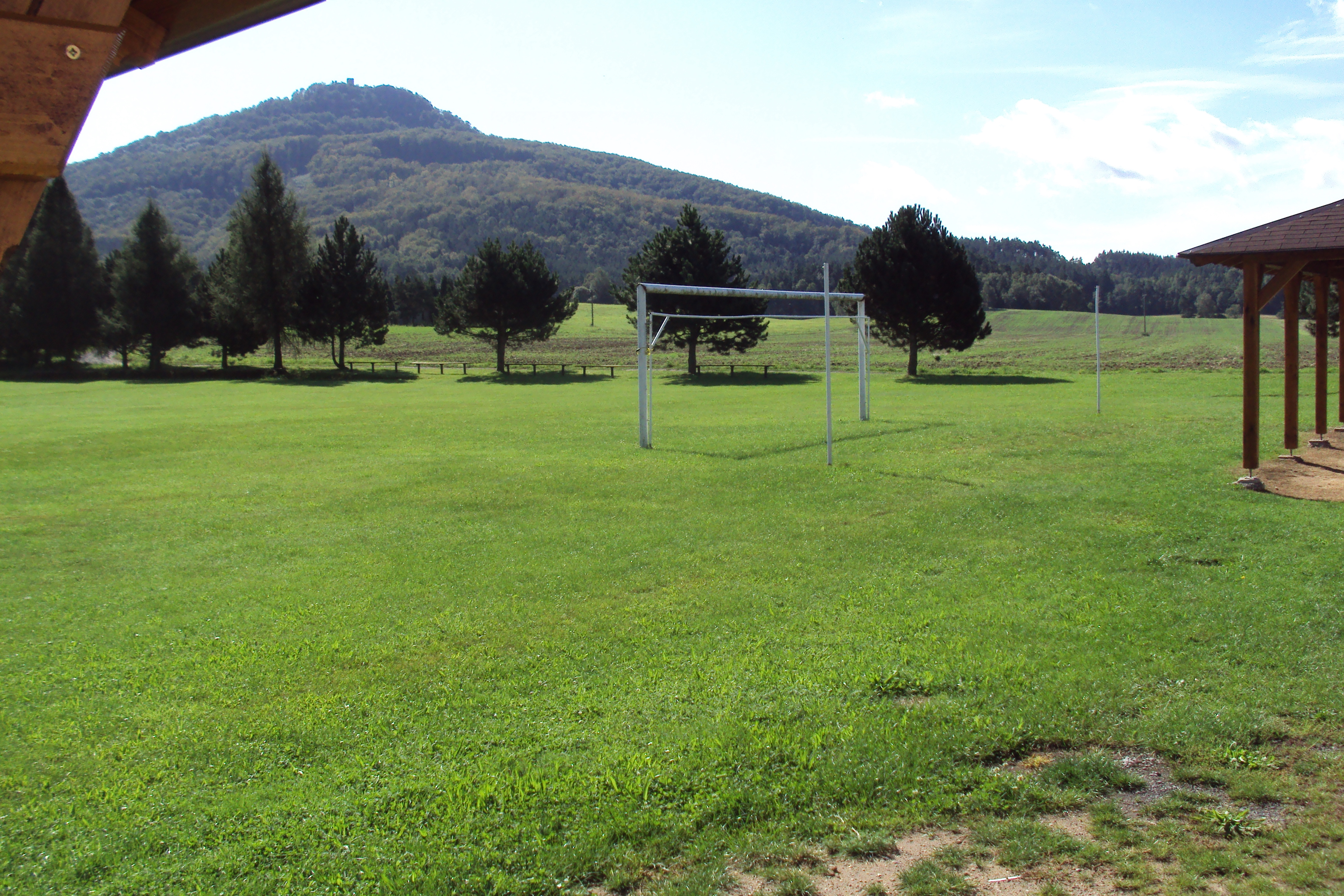 Fotbalové hřiště v Novinách pod Ralskem, vzadu Ralsko